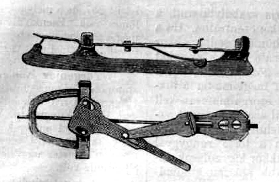 Korcsolya, cikk illlusztráció a Vasárnapi Ujság 1884-es lapszámából "Jégpálya ! Tükre es jelképe az életnek, csábító, de hazug, fényes, de sikamós jéglapoddal ; — minő kéj végig suhanni simán és nesztelen meszeterülő tiszta meződön, melyen millió sugárkára megtörve csillog a csillagok fénye, mig a könnyű korcsolya rezgő szilánkokat hasit türelmes hátadon s éles vasával ábrándos arabeszkeknek most gömbölydeden kanyargó, majd merészen kiszögellő idomait rajzolja rá."